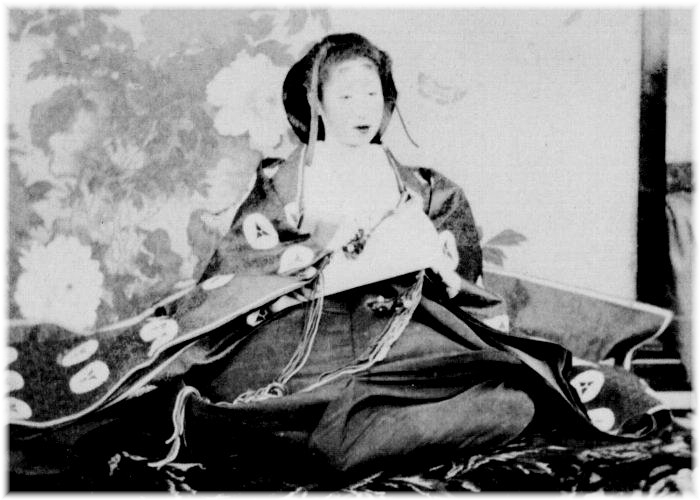 井伊宜子肖像写真